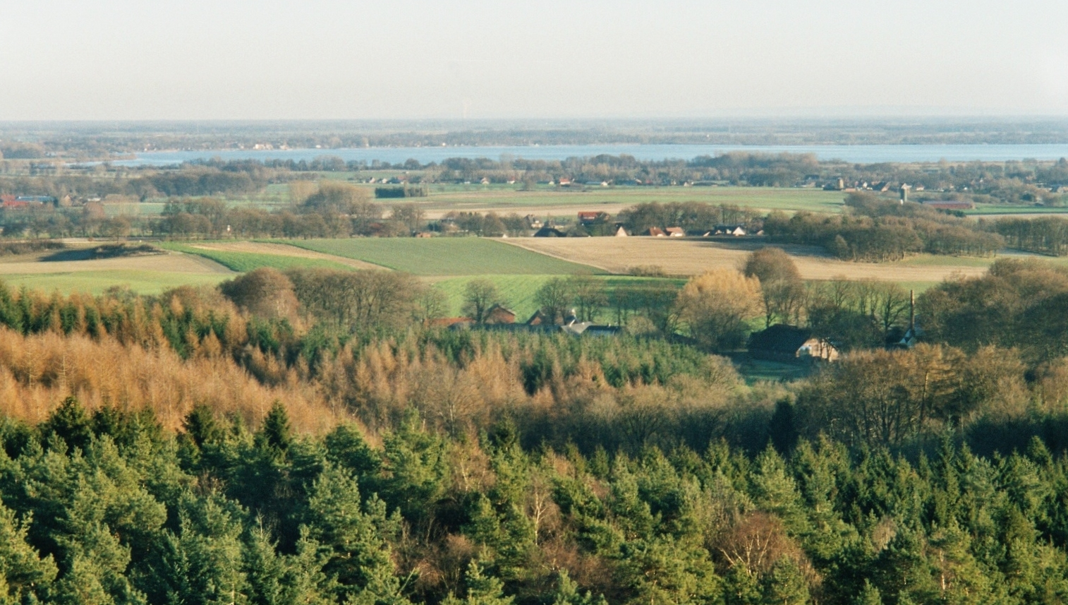 Blick über die Dammer Berge Richtung Dümmer vom Aussichtsturm Mordkulenberg aus